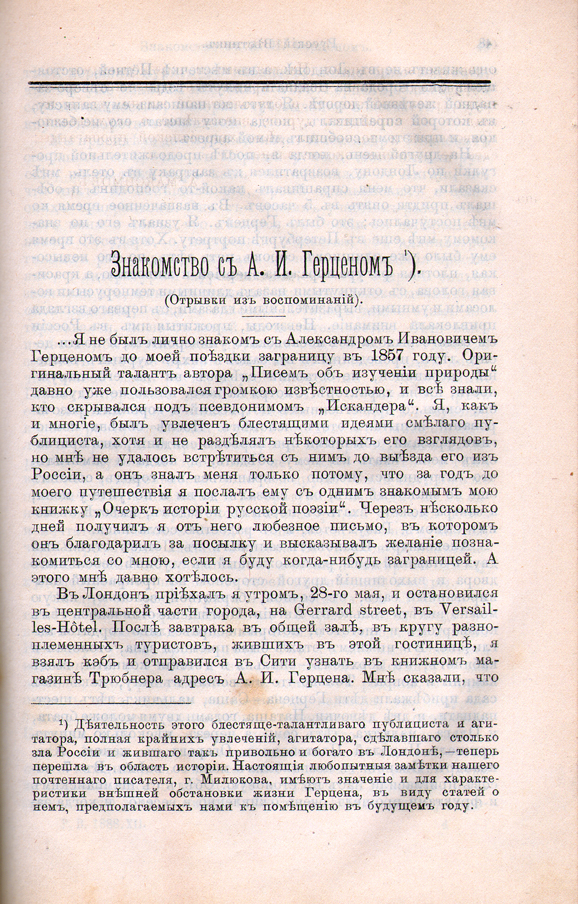 «Знакомство с А. И. Герценом». Отрывки из воспоминаний